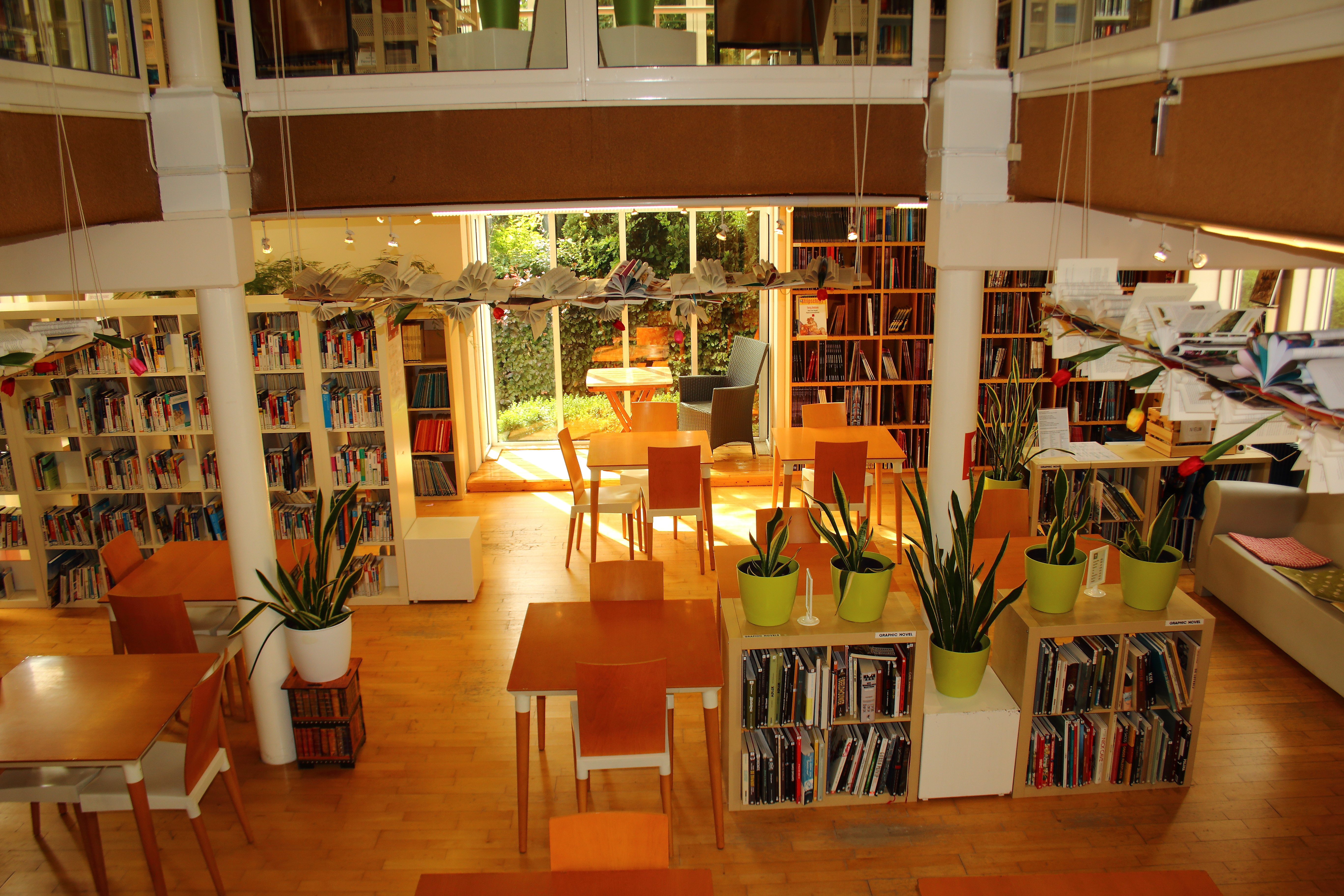 Egmontkasteel/ Kasteel van Egmont, Zottegem, Vlaanderen, België